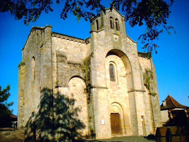 L'Eglise du Bourg (46120) en fin de journée